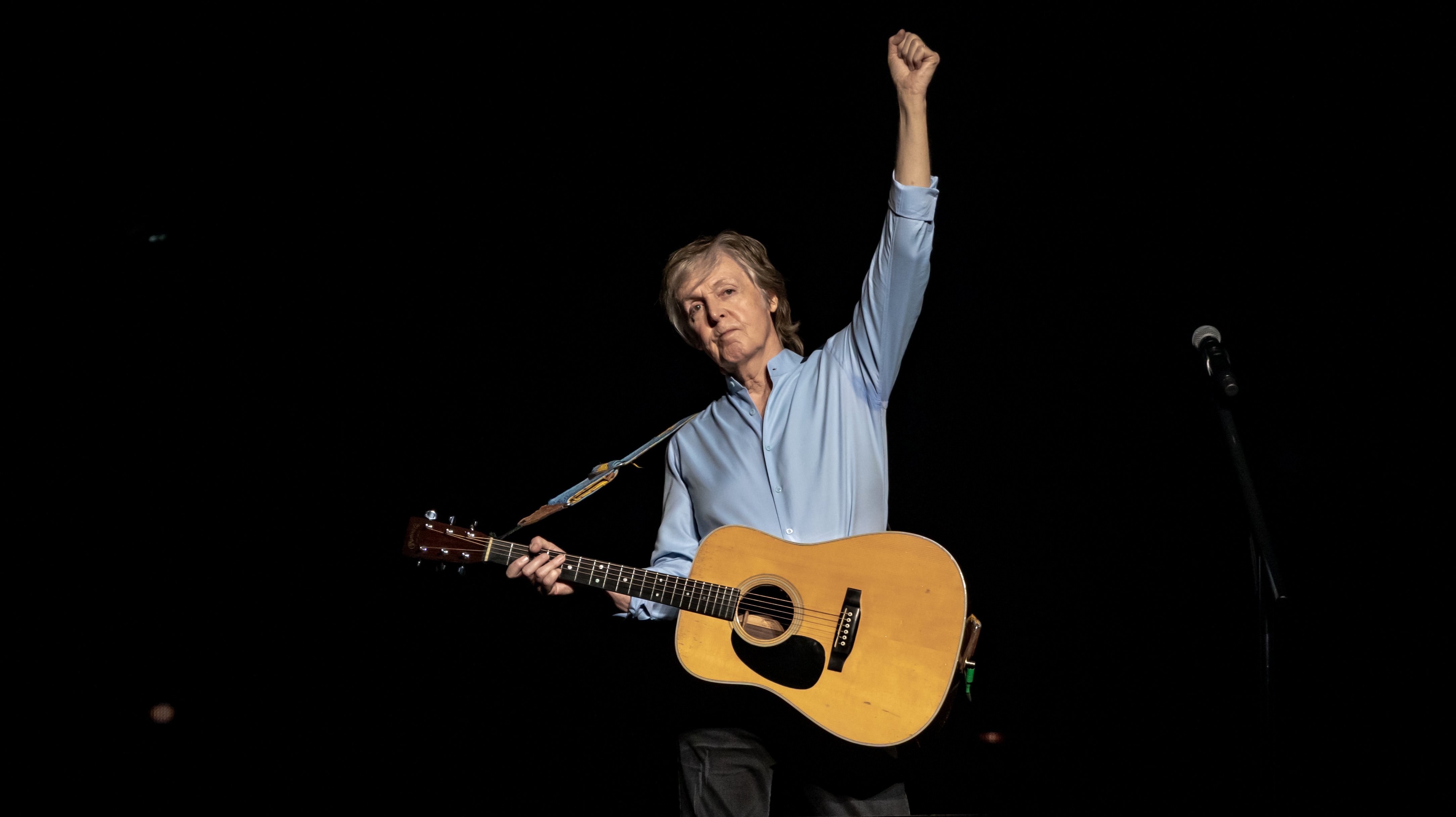 MaccaO2161218-60